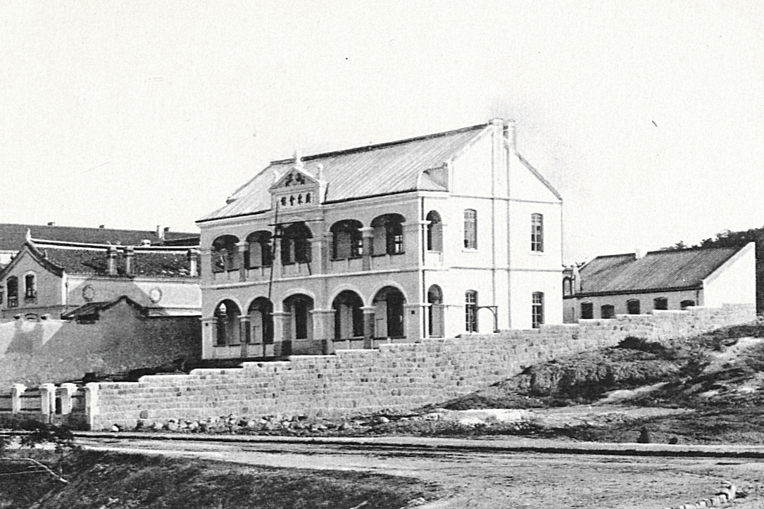 青岛广东会馆